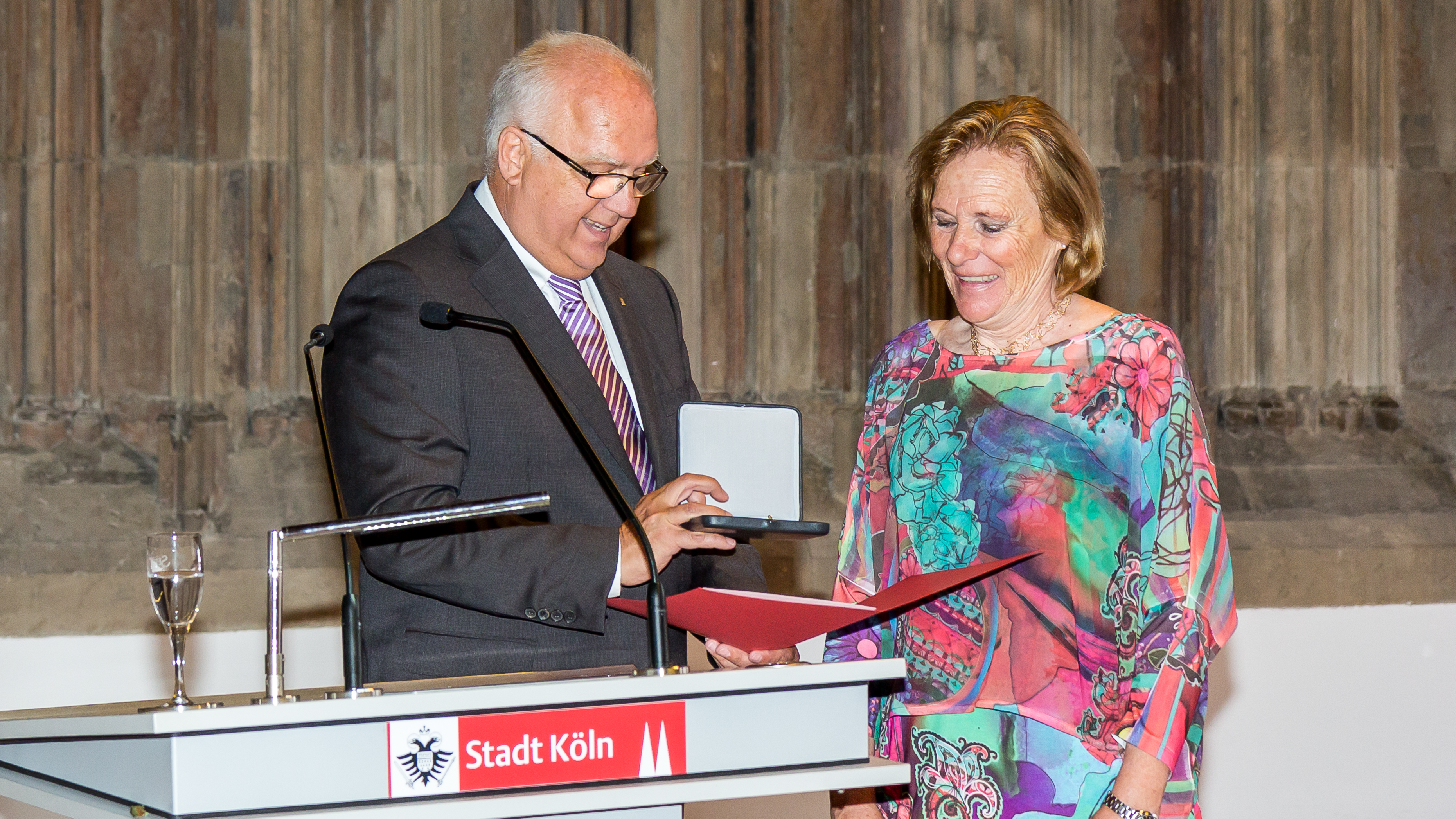 Verleihung der Jabach-Medaille postum an Josef Haubrich im Hansasaal des Historischen Rathauses von Köln. Bürgermeister Hans-Werner Bartsch verleiht die Jabach-Medaille postum an Josef Haubrich, entgegengenommen von der Enkelin Heidi Meyer